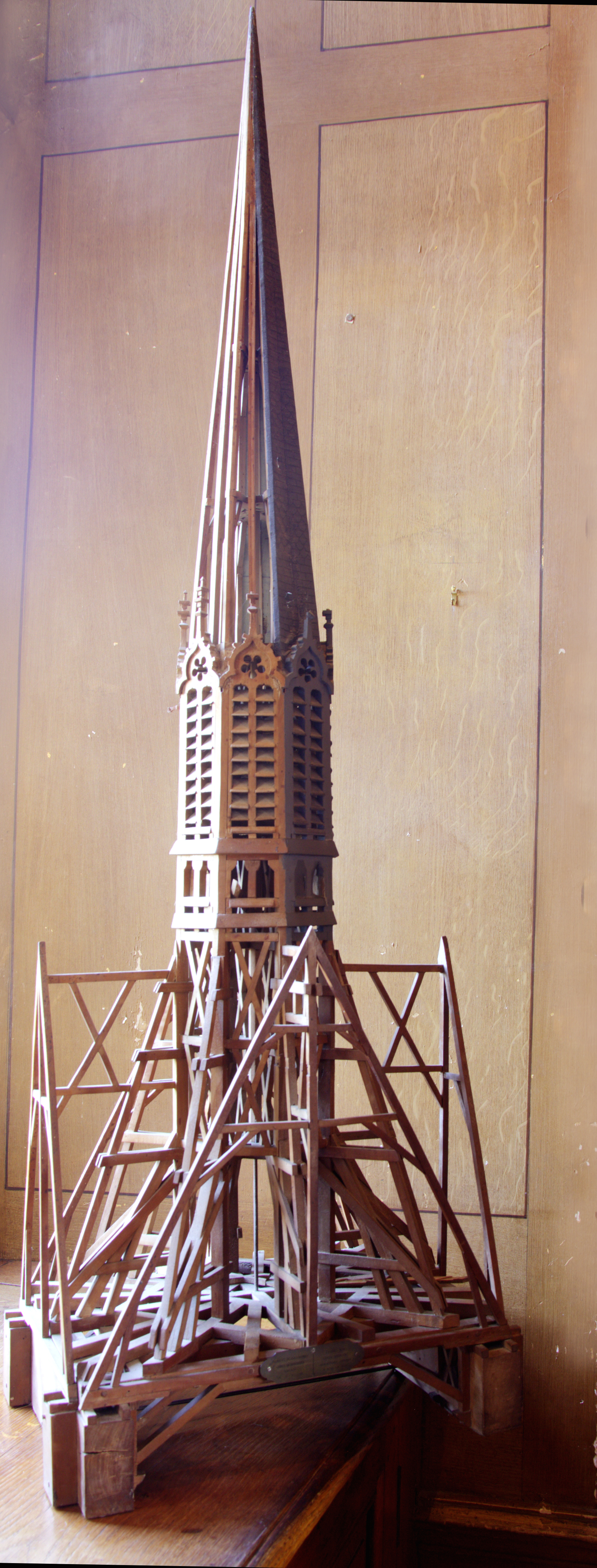 Maquette du clocher de l'église Saint-Jean-Baptiste